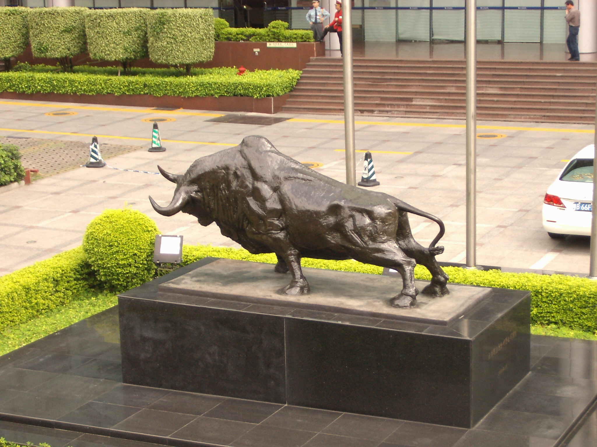 深圳开荒牛